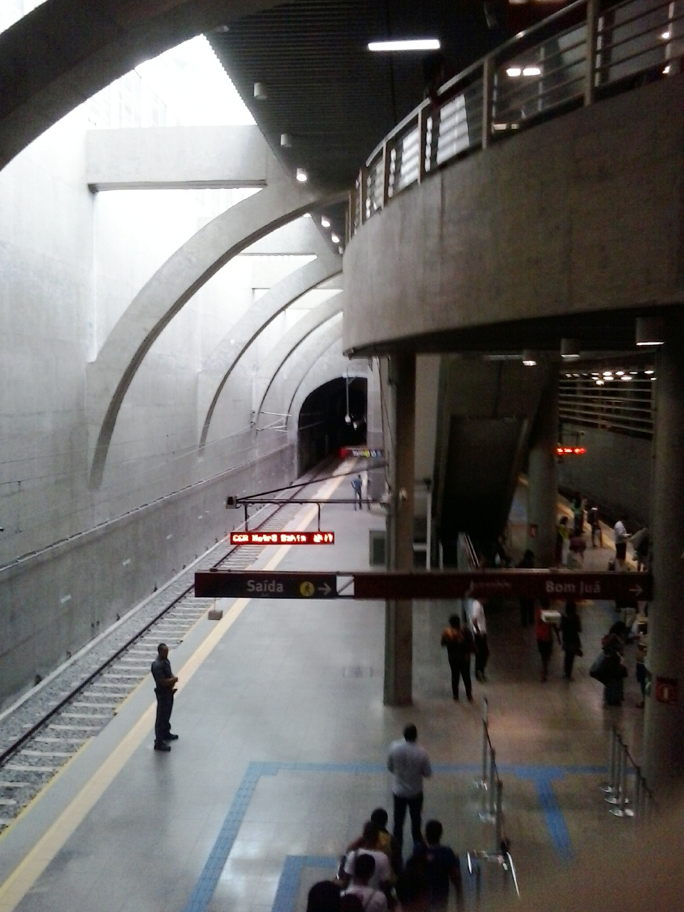 Interior da Estação Lapa do metrô de Salvador, Salvador, Bahia, Brasil.